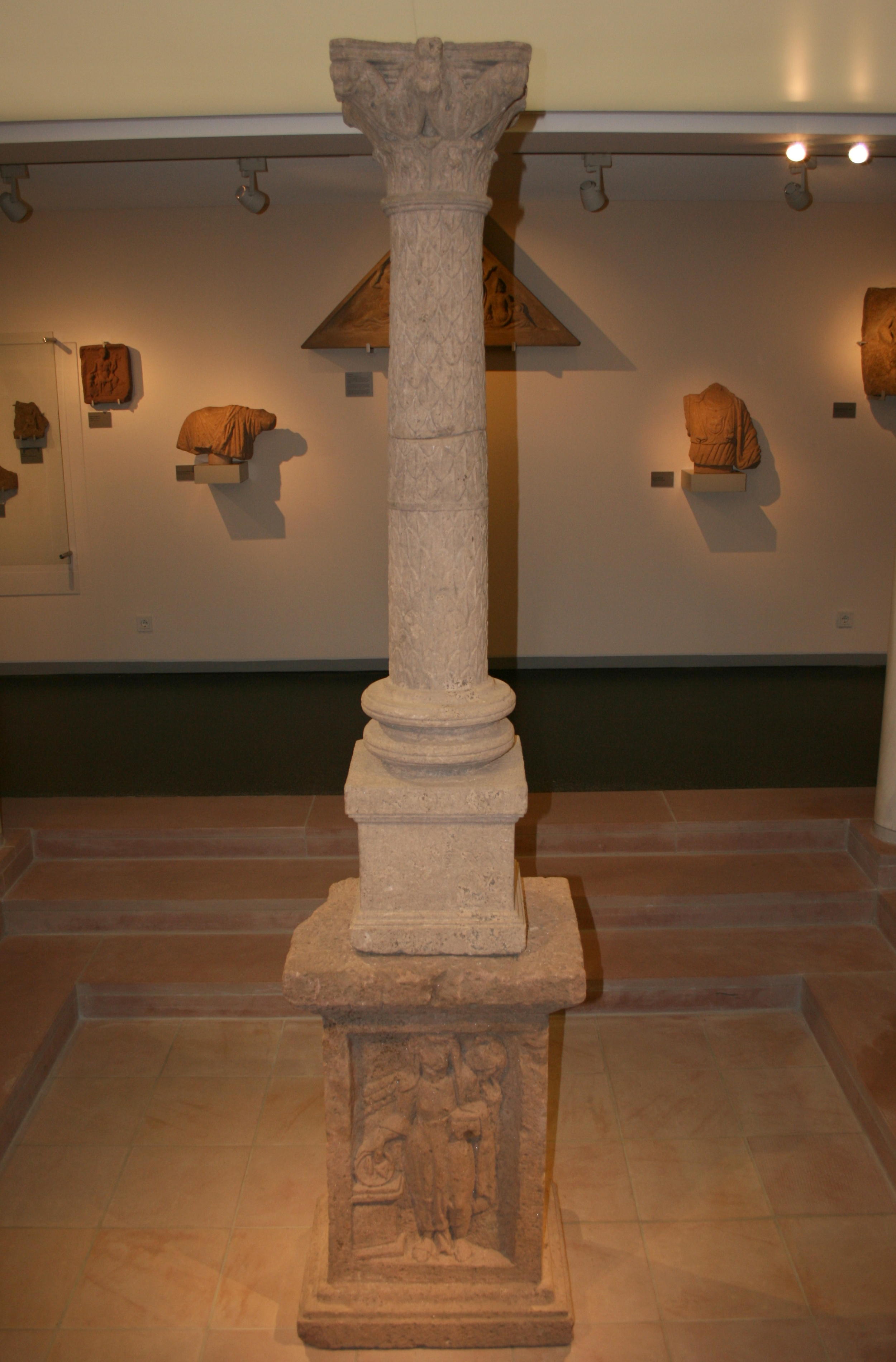 Teile einer Jupitergigantensäule, ausgestellt im Museum Schloss Fechenbach, Dieburg.